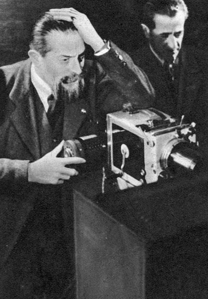 Il regista Roberto Omegna (1876-1948) in una foto della fine degli anni Trenta. Dalla rivista Cinema, quindicinale di divulgazione cinematografica, V, 92, 25 aprile 1940, pag. 270.